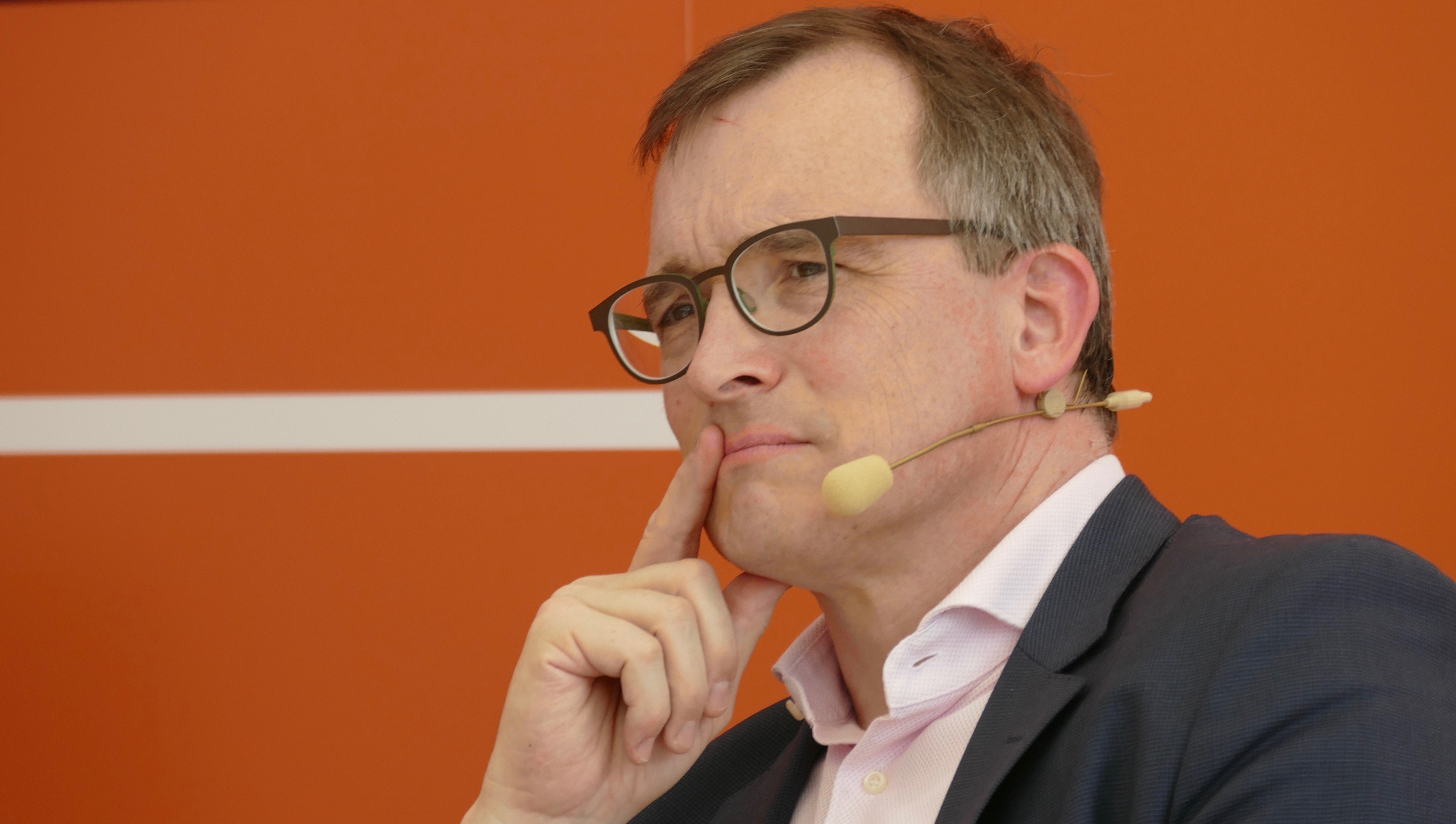 Andreas Rödder stellt auf der Leipziger Buchmesse 2019 sein Buch "Konservativ 21.0. Eine Agenda für Deutschland" (C. H. Beck) vor